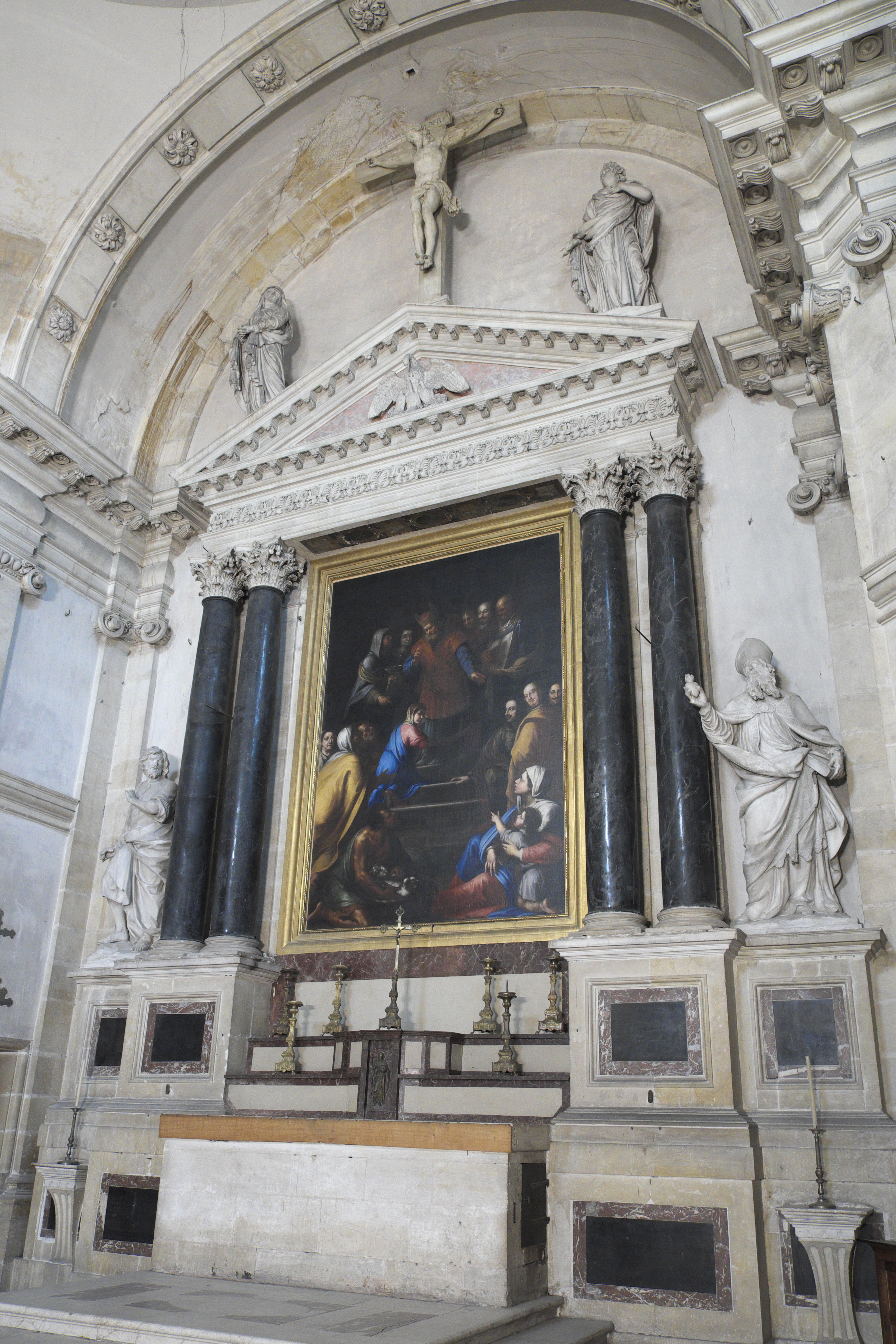 Kapelle Saint-Joseph, ehemalige Kapelle des Ordens von der Heimsuchung Mariens (Chapelle de la Visitation) in Moulins im Département Allier (Auvergne-Rhône-Alpes/Frankreich), Altar; Altarbild von Rémy Vuibert, von 1652; Darstellung: Mariä Tempelgang